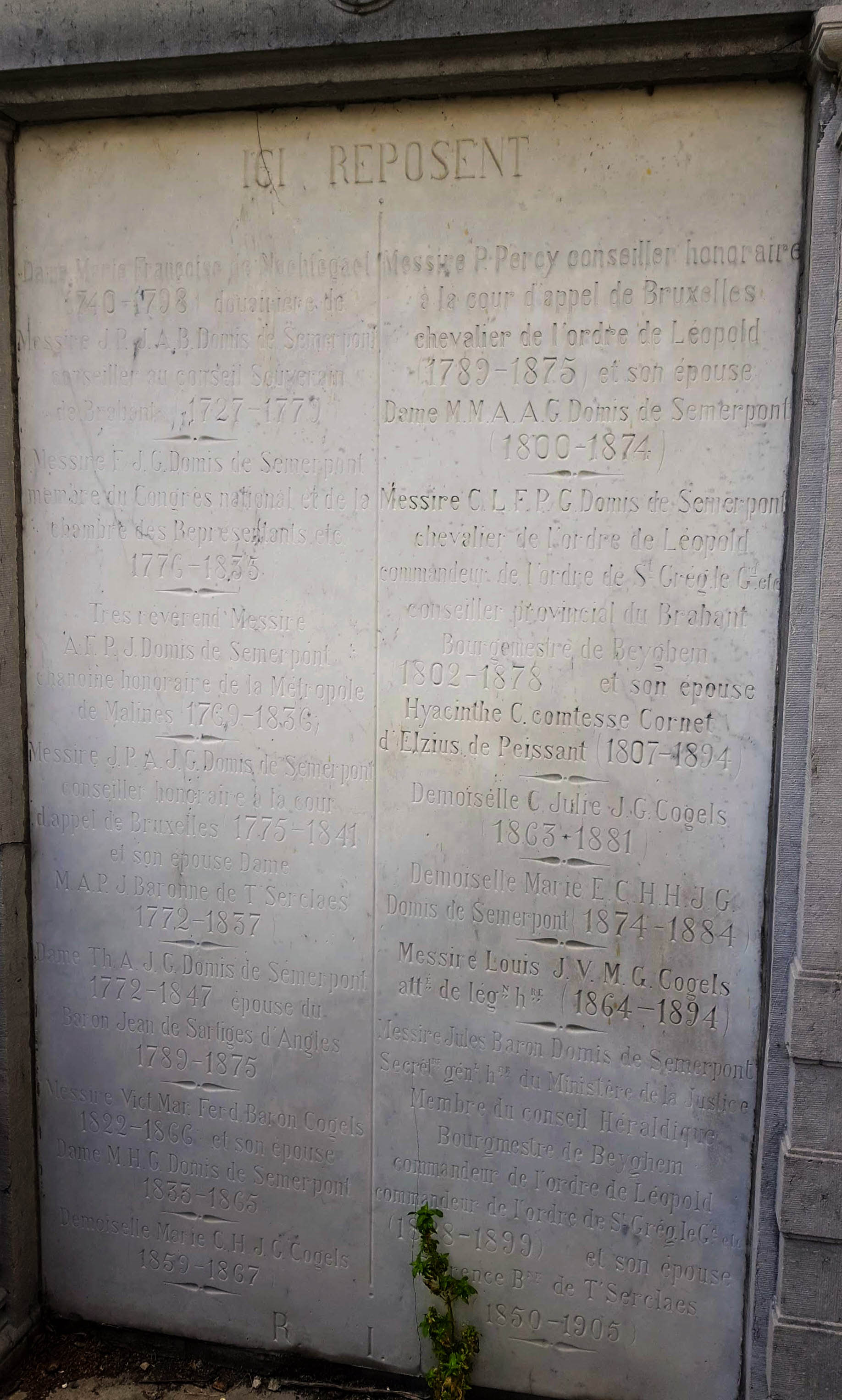 Grafmonument op Oostelijke zijde van de kerk van Beigem